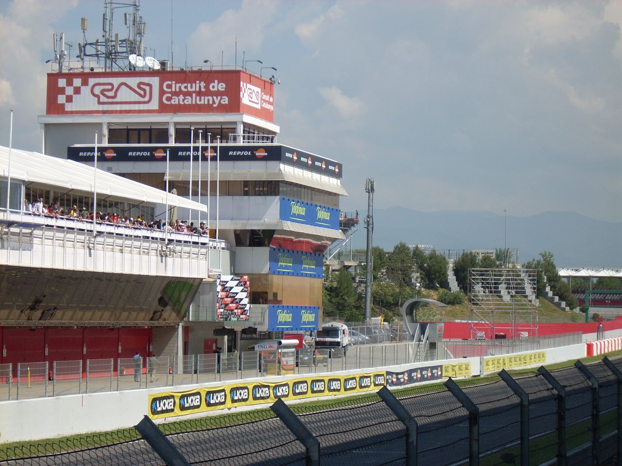 Circuit de Catalunya, Montmeló (Vallès Oriental), Catalunya.468795861